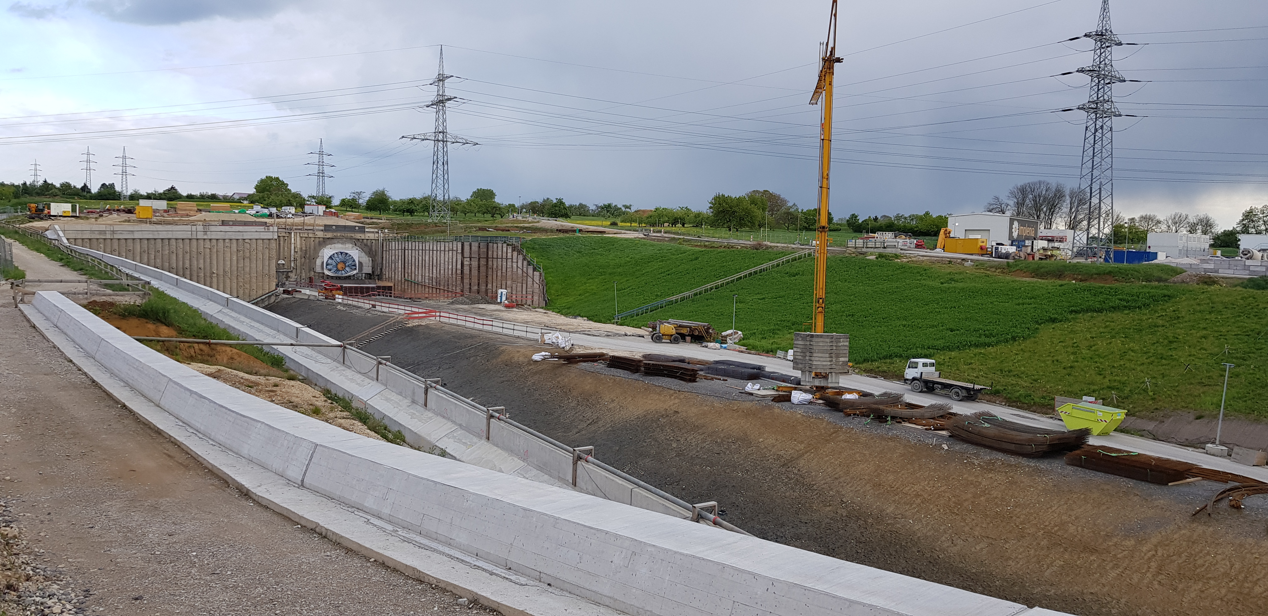 Blick auf das zukünftige Westportal des Albvorlandtunnels. Rechts, durch ein Blumenbanner überdeckt, endet die zukünftige Südröhre, an der Bohrpfahlwand links entstehen die Portale für die Nordröhre sowie der Güterzuganbindung.